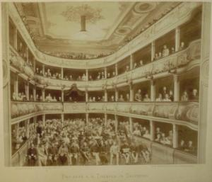 das alte k. k. Theater in Salzburg